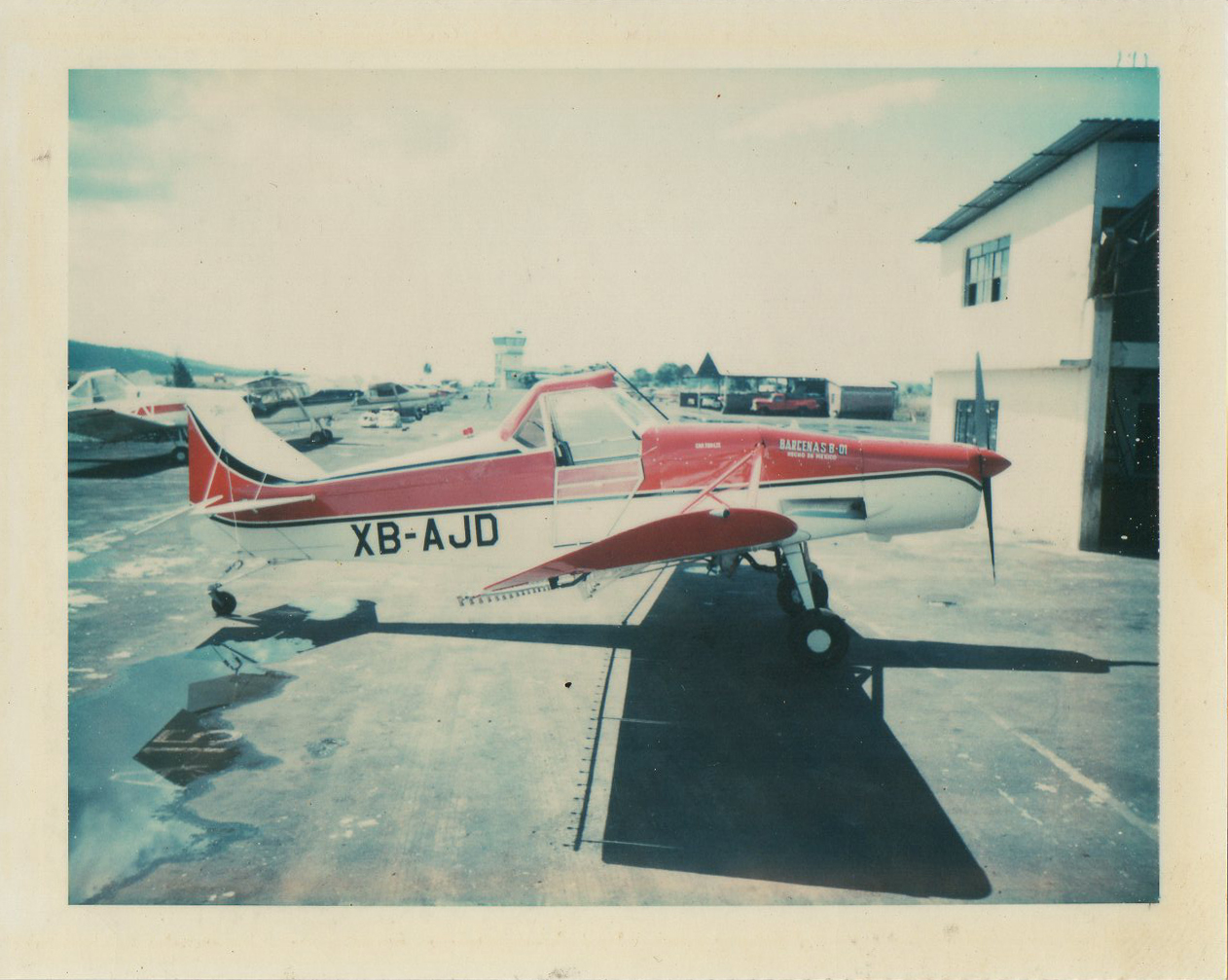 AVIÓN BARCENAS 01